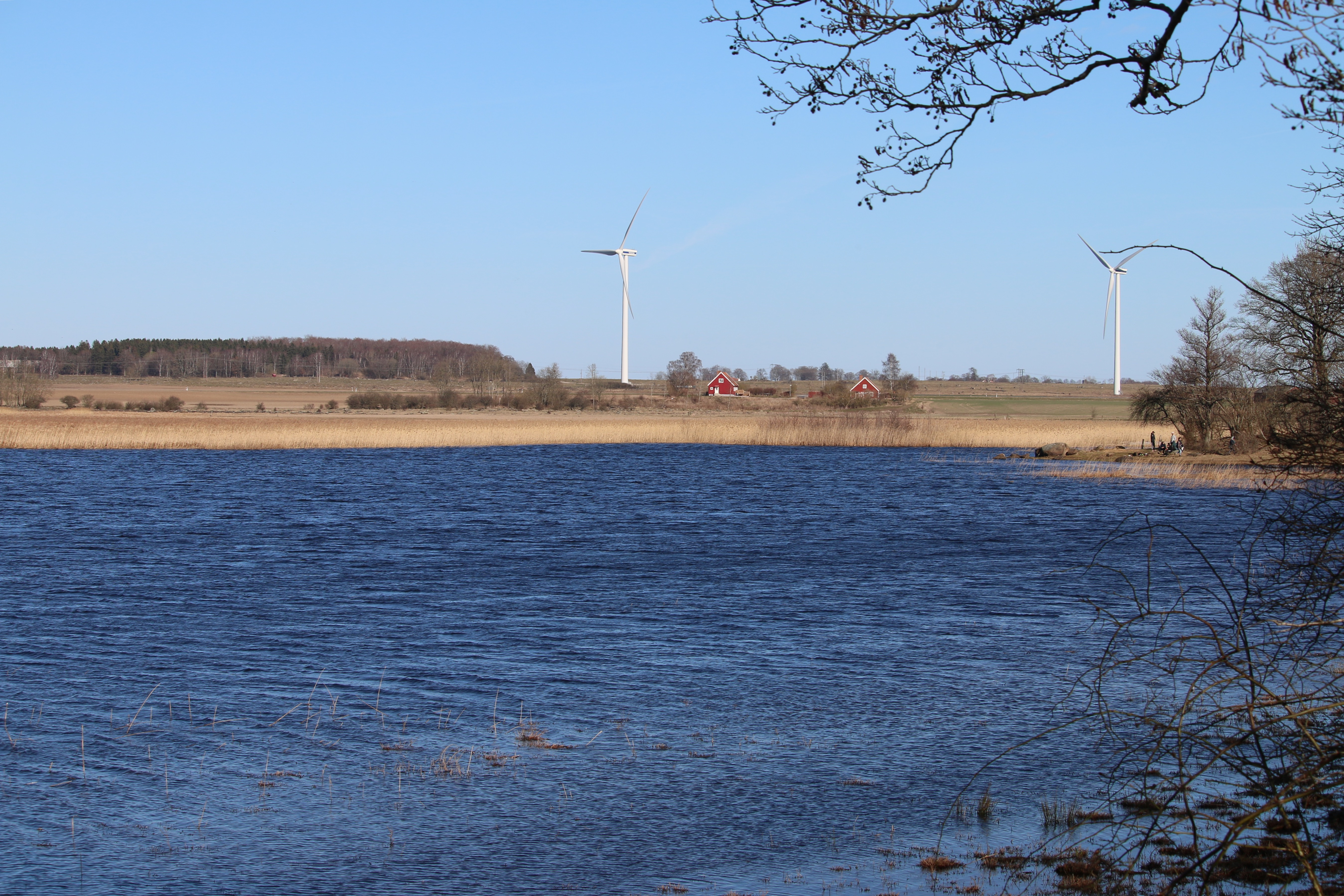 Araslövssjön